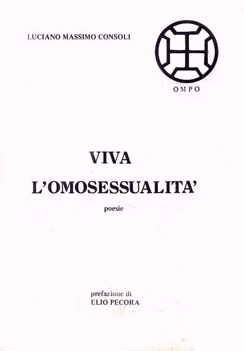 Copertina di "Massimo.Consoli (1975) Viva l'omosessualità, Ompo, Roma "